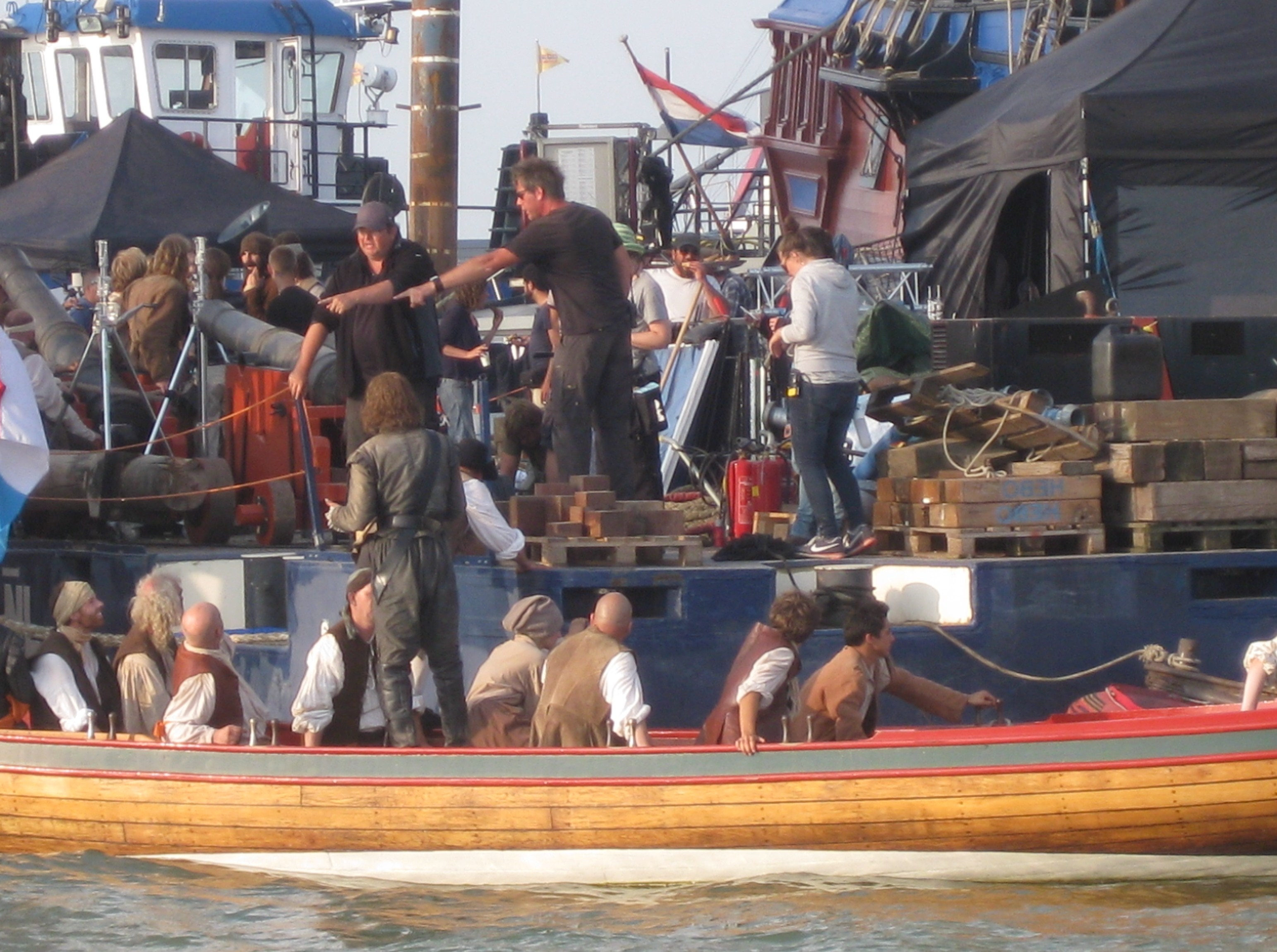 Opnamen van de speelfilm Michiel de Ruyter in het Markermeer bij Lelystad. In het midden met pet regisseur Roel Reiné